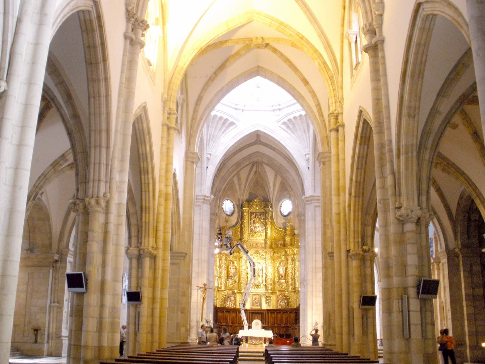 Catedral de Santander (Cantabria)